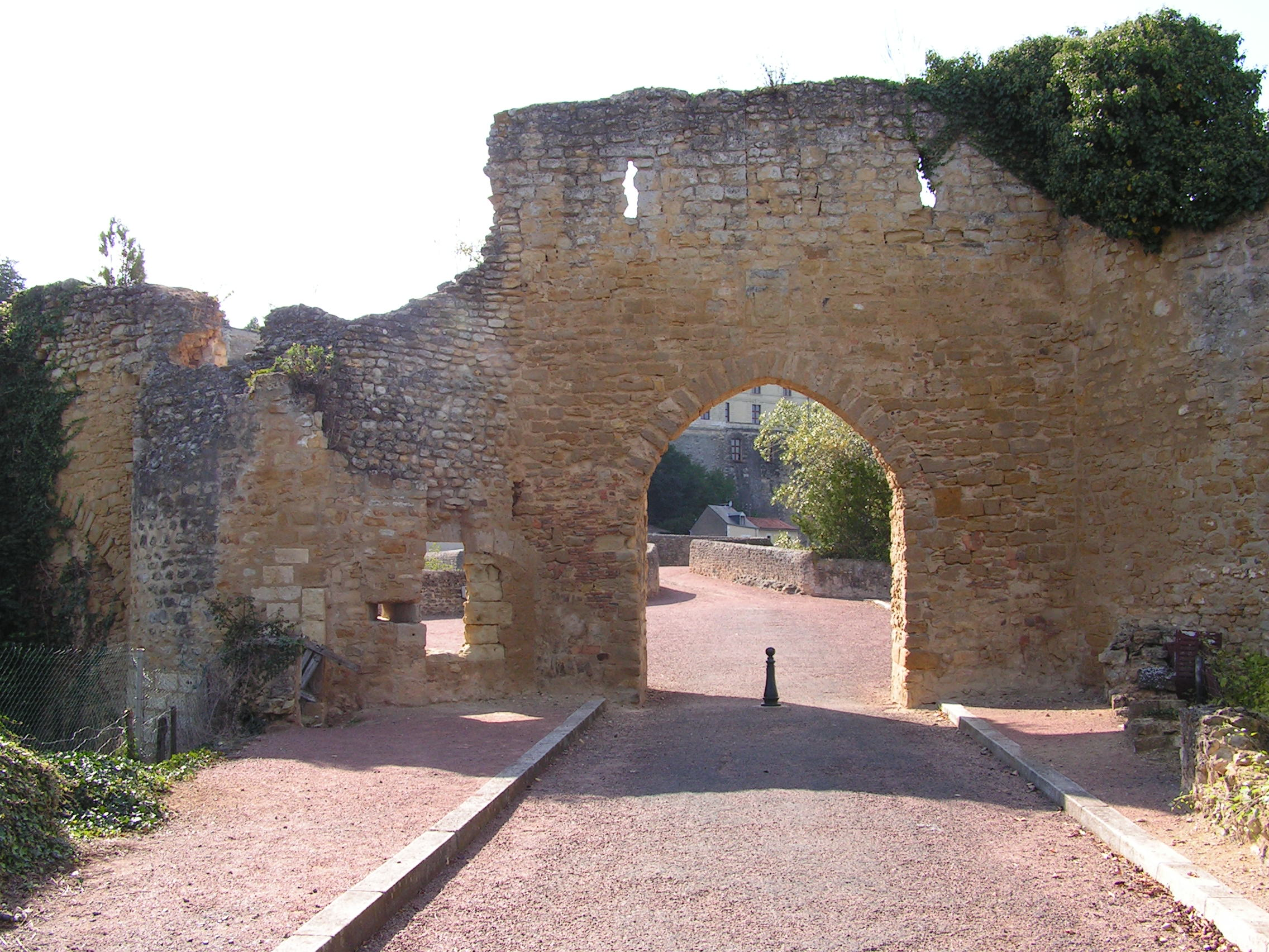 Porte Maillot, Thouars, Deux-Sèvres, France